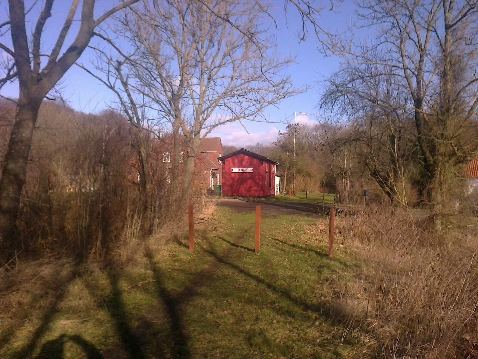 Oldrup trinbræt